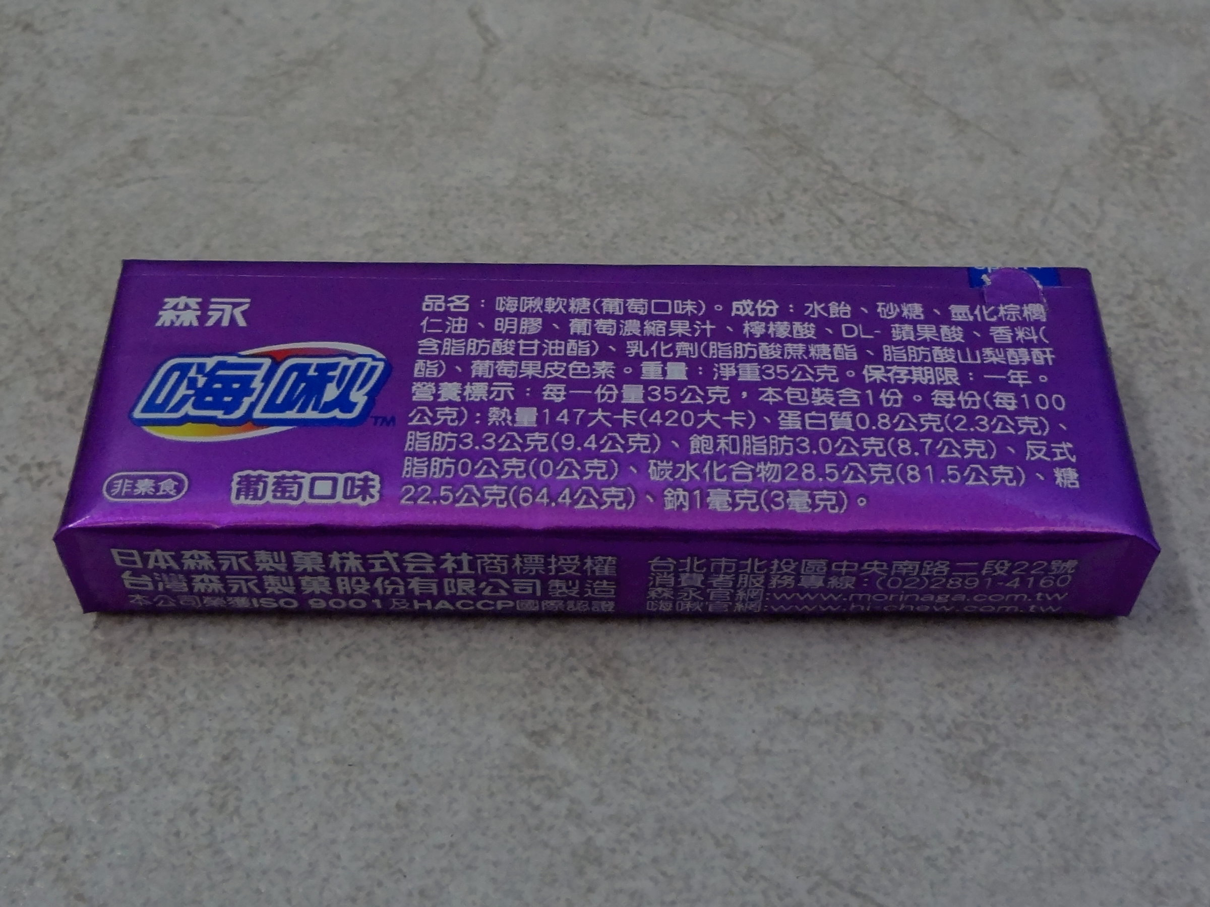 台灣森永製菓製造的森永嗨啾軟糖葡萄口味35公克包。